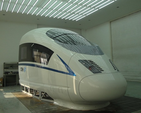 高速鉄道模型1/1サイズ